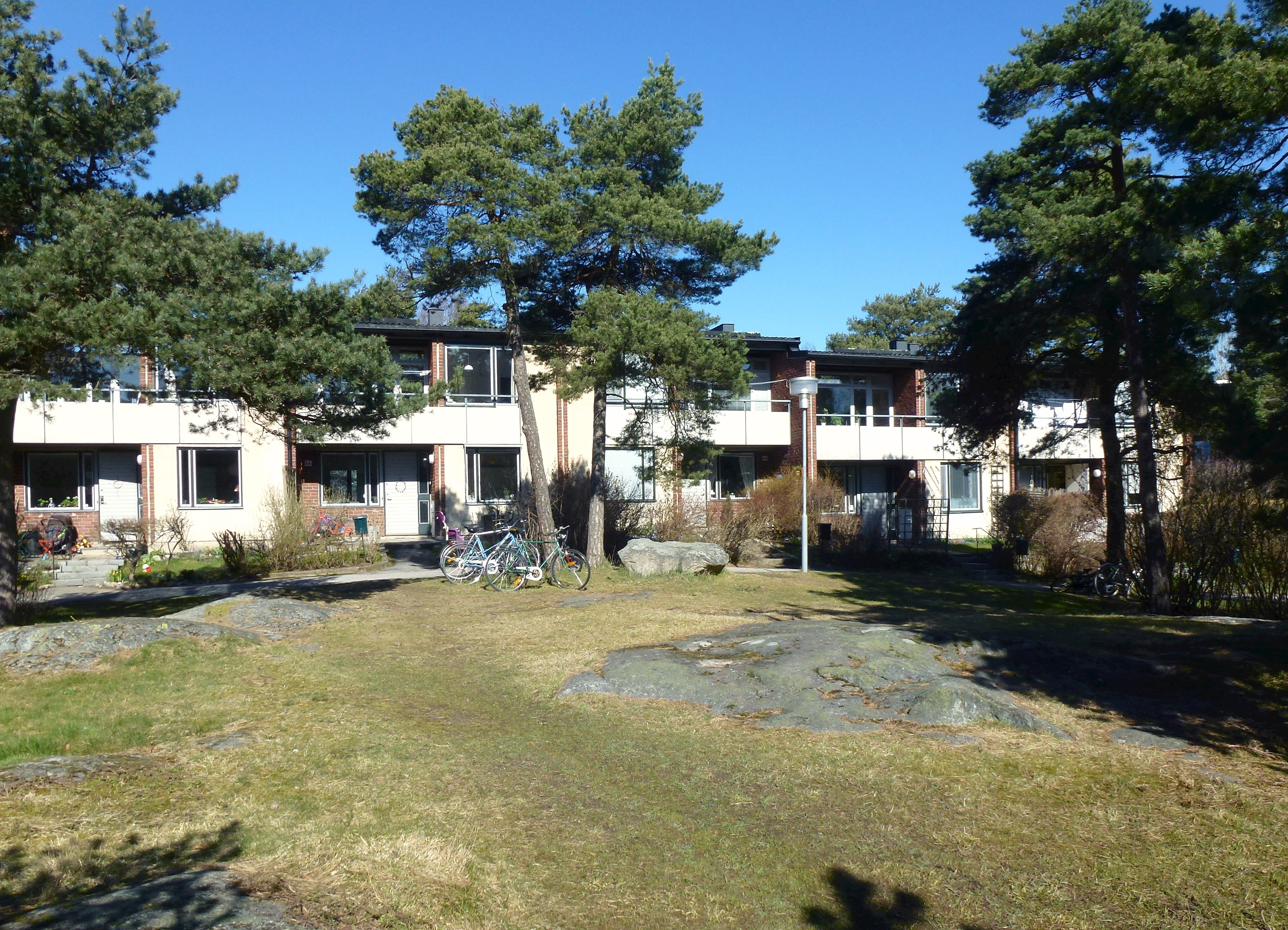 Riksrådsvägens radhusområde, arkitekt Charles-Edouard Geisendorf och Léonie Geisendorf